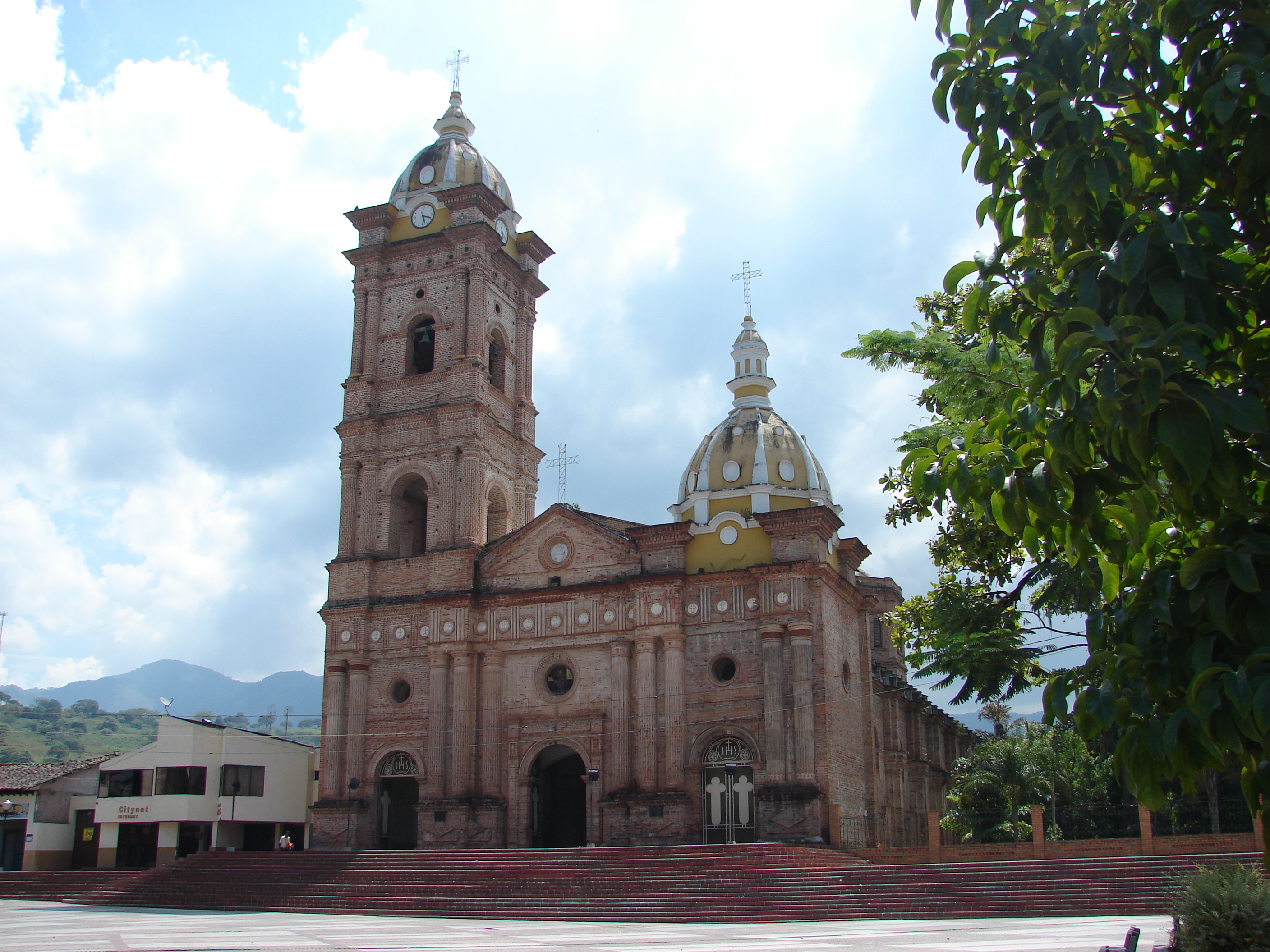 Catedral de San Callixto. Timaná-Huila. A Pulido-Villamarín